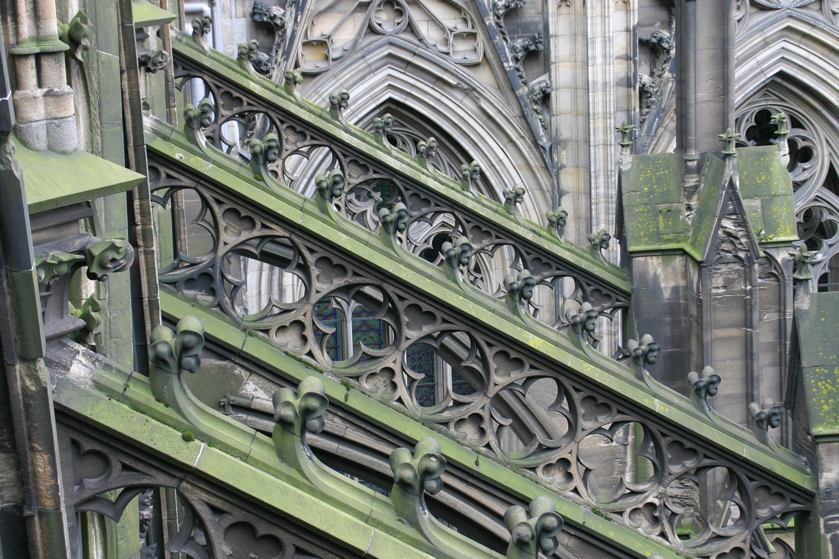 Moose und Flechten an der Architektur des Kölner Doms.